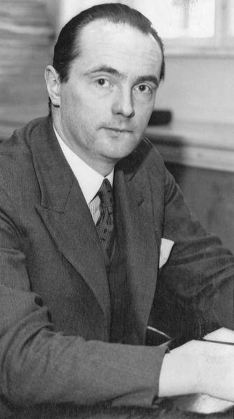 portrett, mann, matematiker, ingeniør, professor, sittende halvfigur.